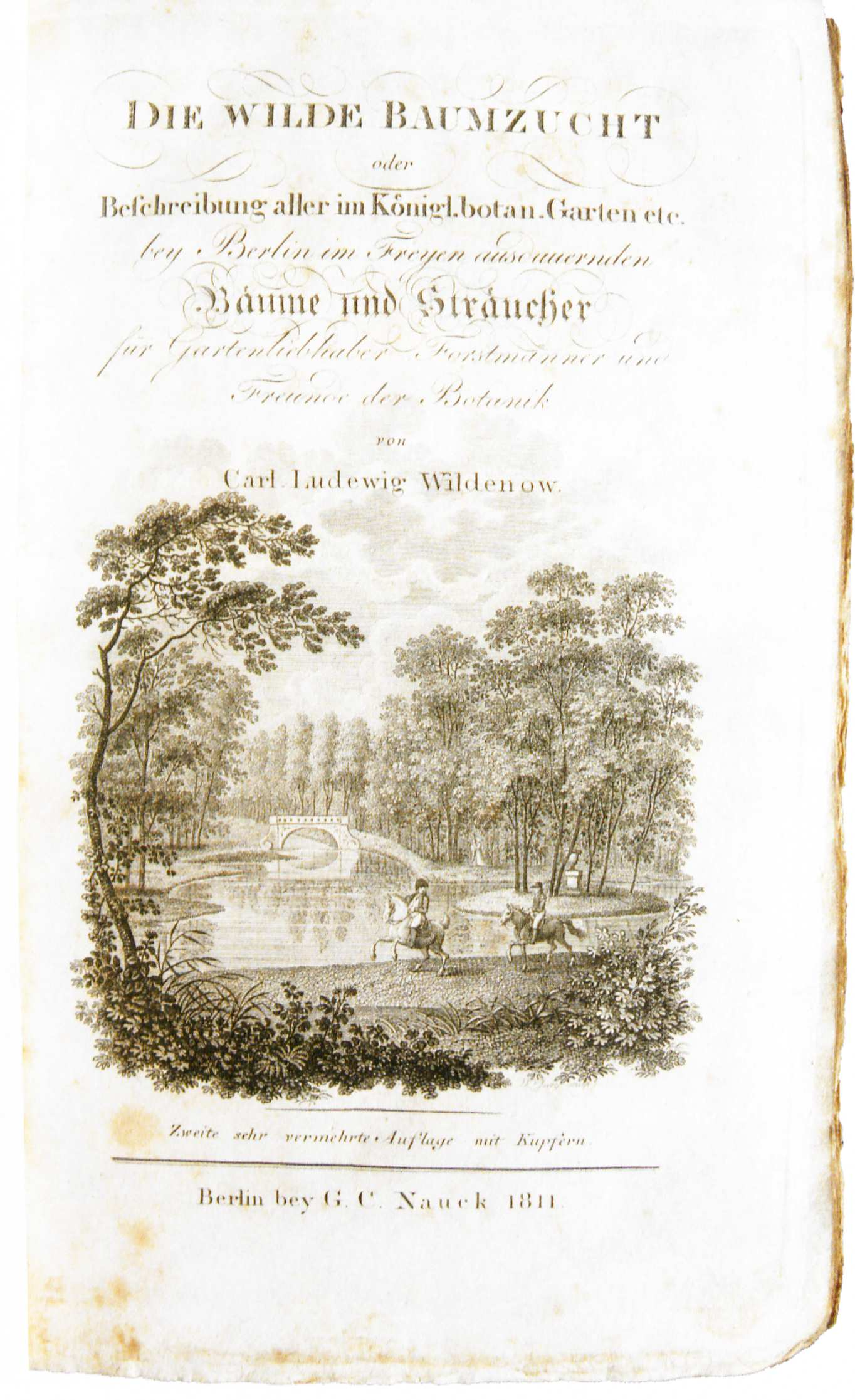 Carl Ludwig Willdenow Die wilde Baumzucht 1811